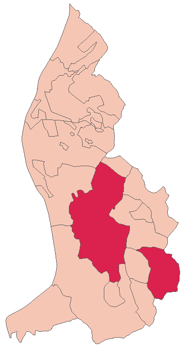 Municipalities of Liechtenstein: Triesenberg